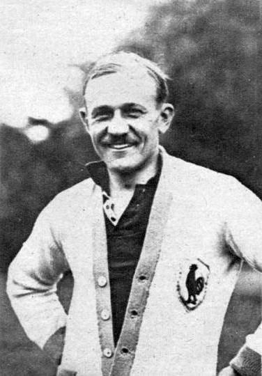 Henri Bard, capitaine de l'équipe de France de football demi-finaliste des Jeux olympiques en août 1920.